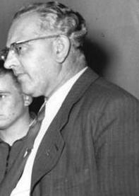 Rudolf Jahn im Gespräch Unsere Mähdrescherführer sind bereit. Nur noch wenige Tage bis zum Beginn der einbringenden Ernte 1953. Bald werden die Mähdrescher aus der Sowjetunion über die Felder rollen. Im Bezirk Dresden werden 16 Stalinnetzt 4 und eine Gesamtfläche von etwa 3 200 Hektar mähen. rechts, der Vorsitzende des Rates des Bezirkes Rudi Jahn im Gespräch mit den Kombineführern (v. links) Kollg. Schmidt, Ternes, Große, Roßberg u. Lätsch Zentralbild-Braun 1.7.1953 Unser Mähdrescherführer sind bereit UBz: (rechts) Der Vorsitzende des Rates des Bezirkes Dresden Rudi Jahn lässt sich con den Kombine-Führern (vlnr) Schmidt, Termes, Grosse, Rossberg und Lätsch ihren Einsatz bei der diesjährien Ernte erläutern. Im Bezirk Dresden werden 16 Kombines vom Typ "Stalinez 4" eine Gesamtfläche von etwa 3200 ha bearbeiten. Abdruck nur mit Urheberangabe